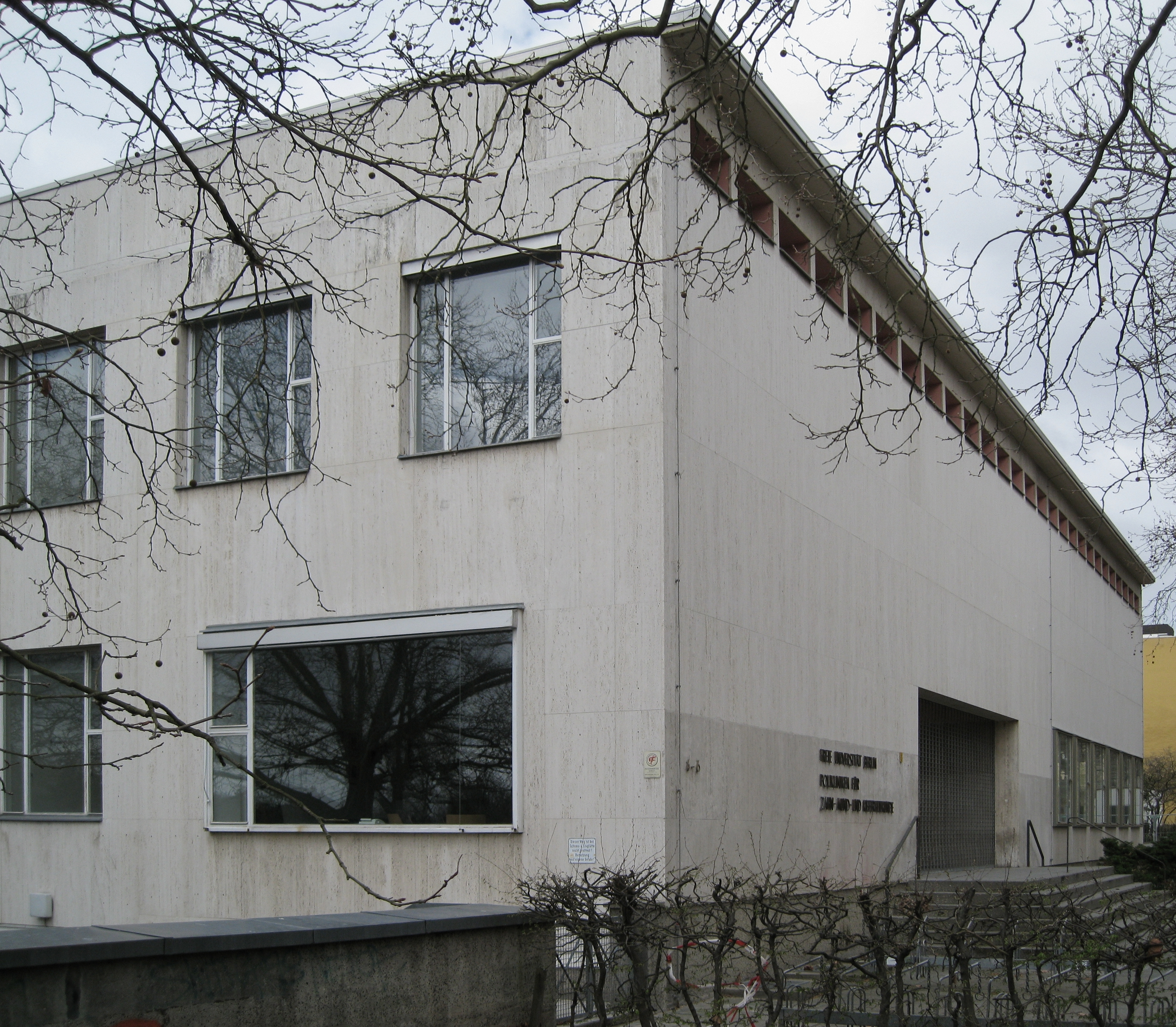 Zahnklinik